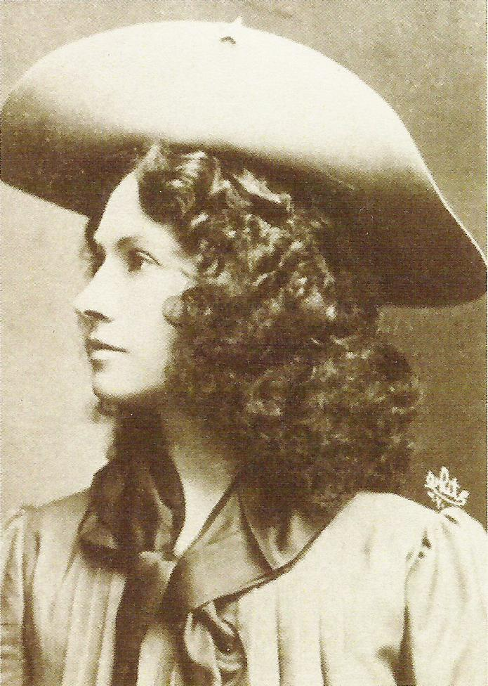 Annie Oakley